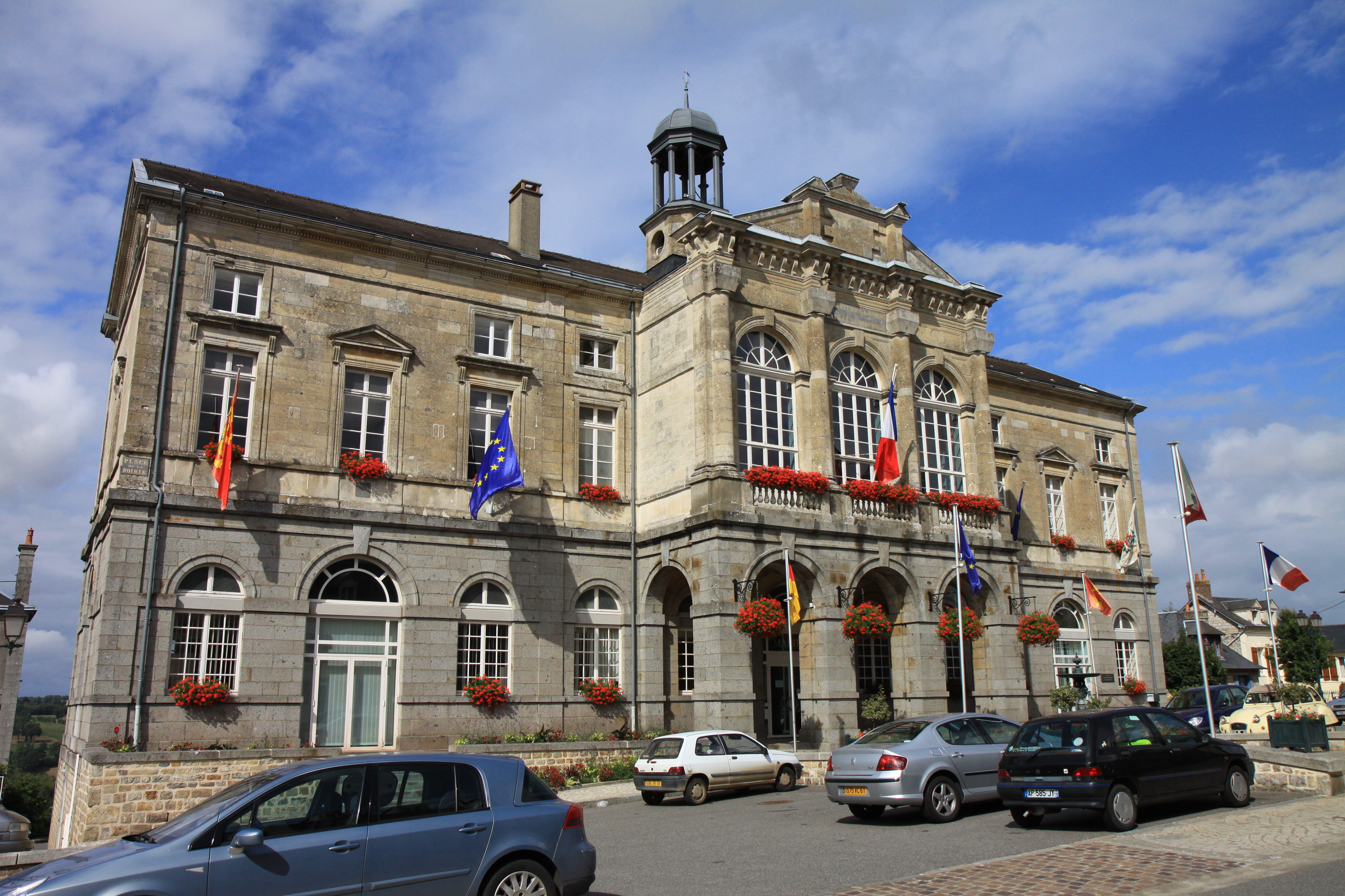 Vue d'ensemble de la mairie.